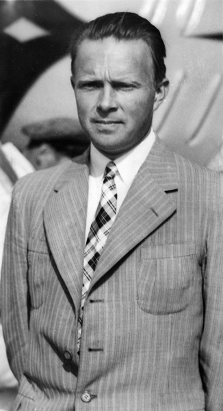 portrett, mann, ingeniør, flykonstruktør, brystbilde.